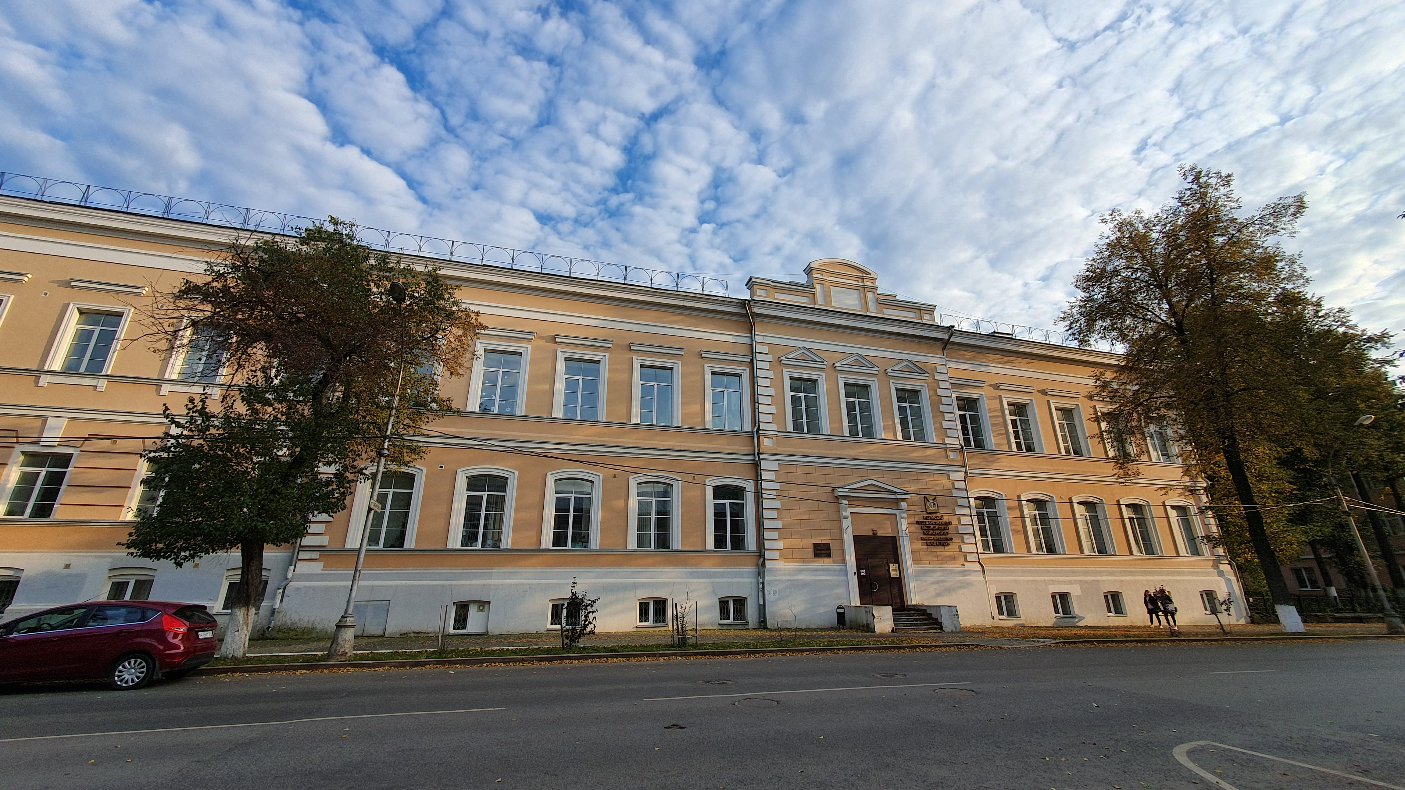 панорамное изображение 2-этажного бежевого здания с подвальными помещениями